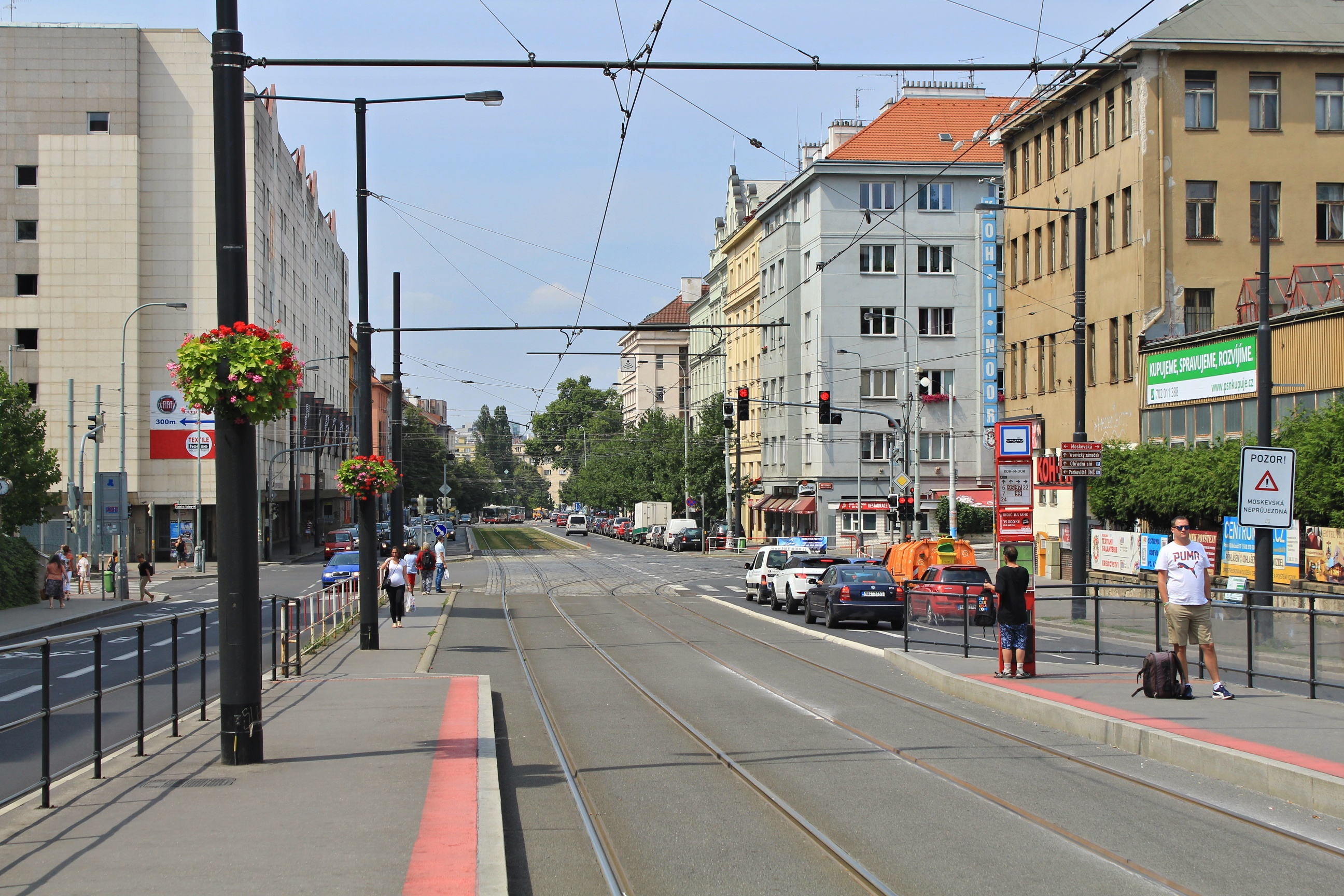 TT Koh-i-noor Vršovice